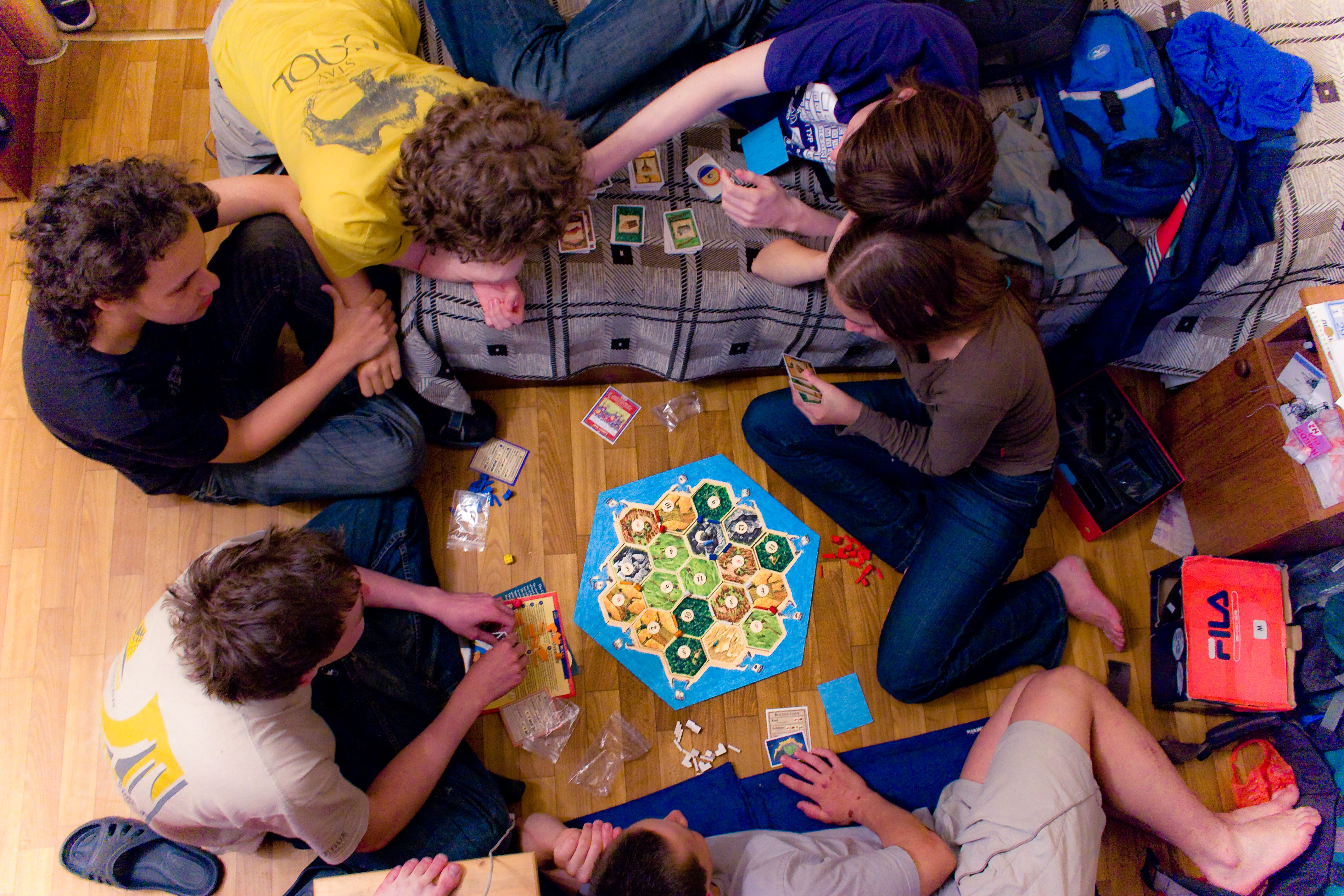 Игра в "Settlers of Catan"